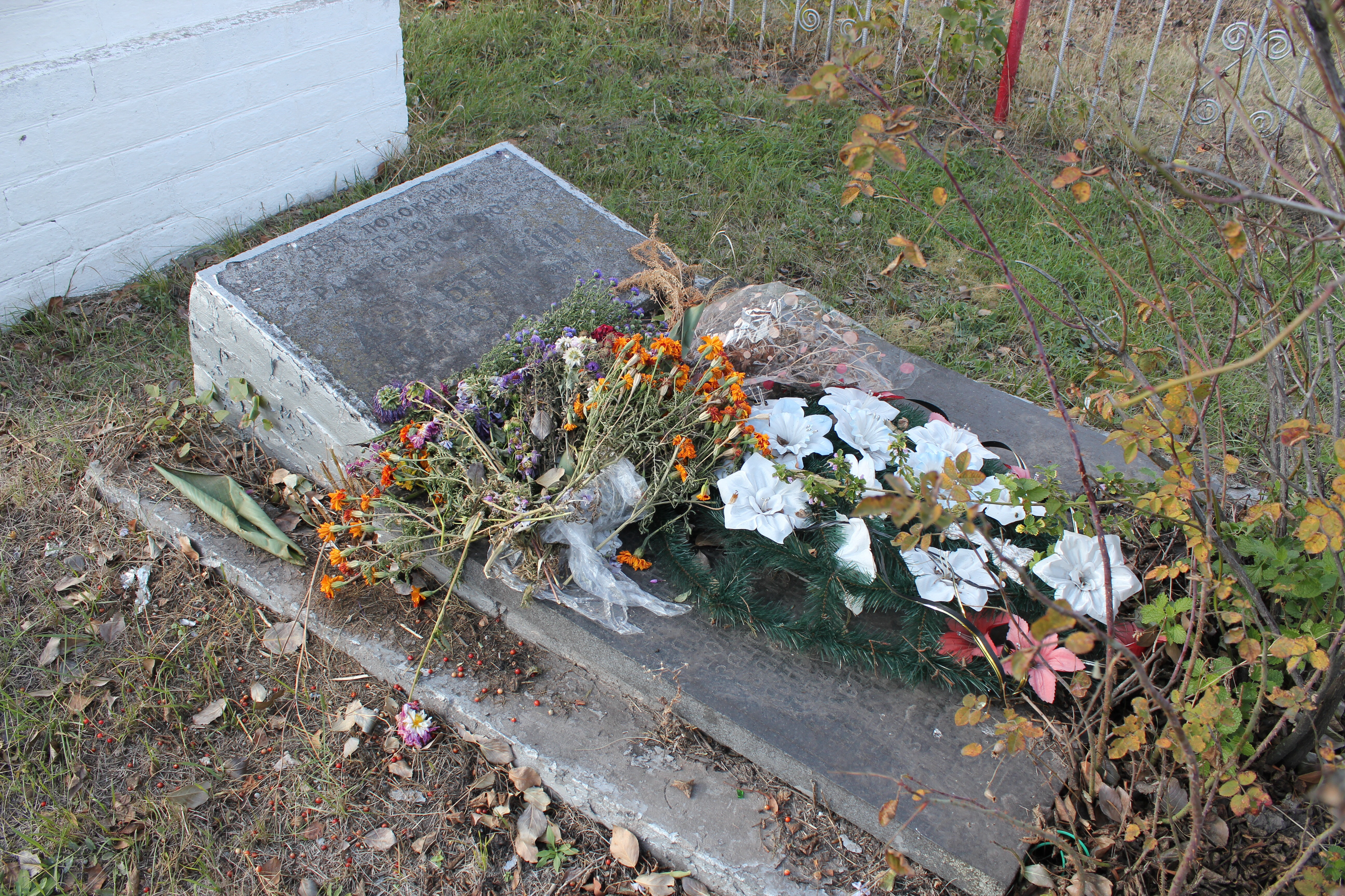 Могила Героя Радянського Союзу Долбешкина П.А., який загинув у роки Великої Вітчизняної війни, село Ташань, біля будинку культури